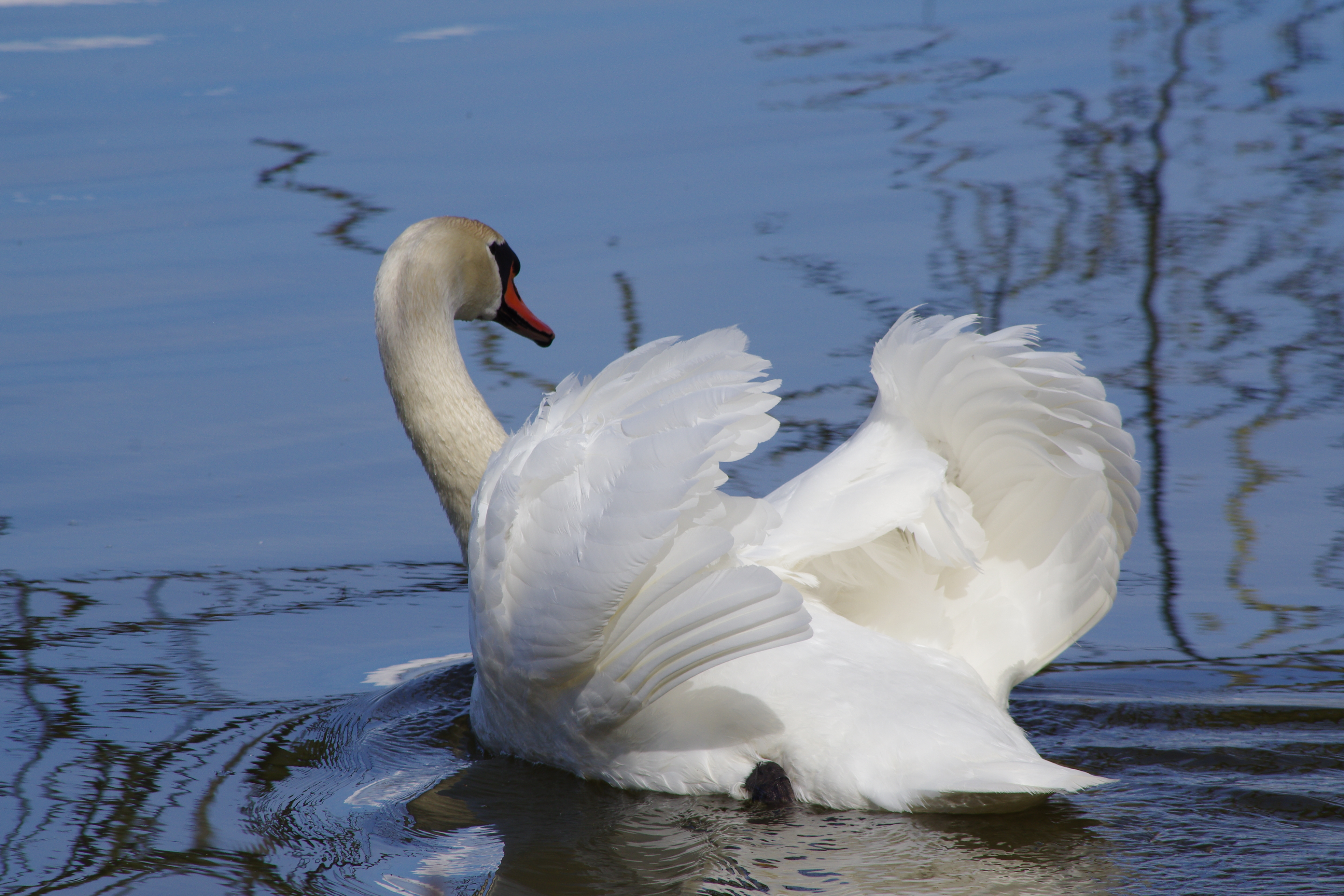 ein stolzer Schwan schwimmt mit Partnerin ungerührt von allem anderen Vogeltrubel über den See und wenig später tanzen beide...